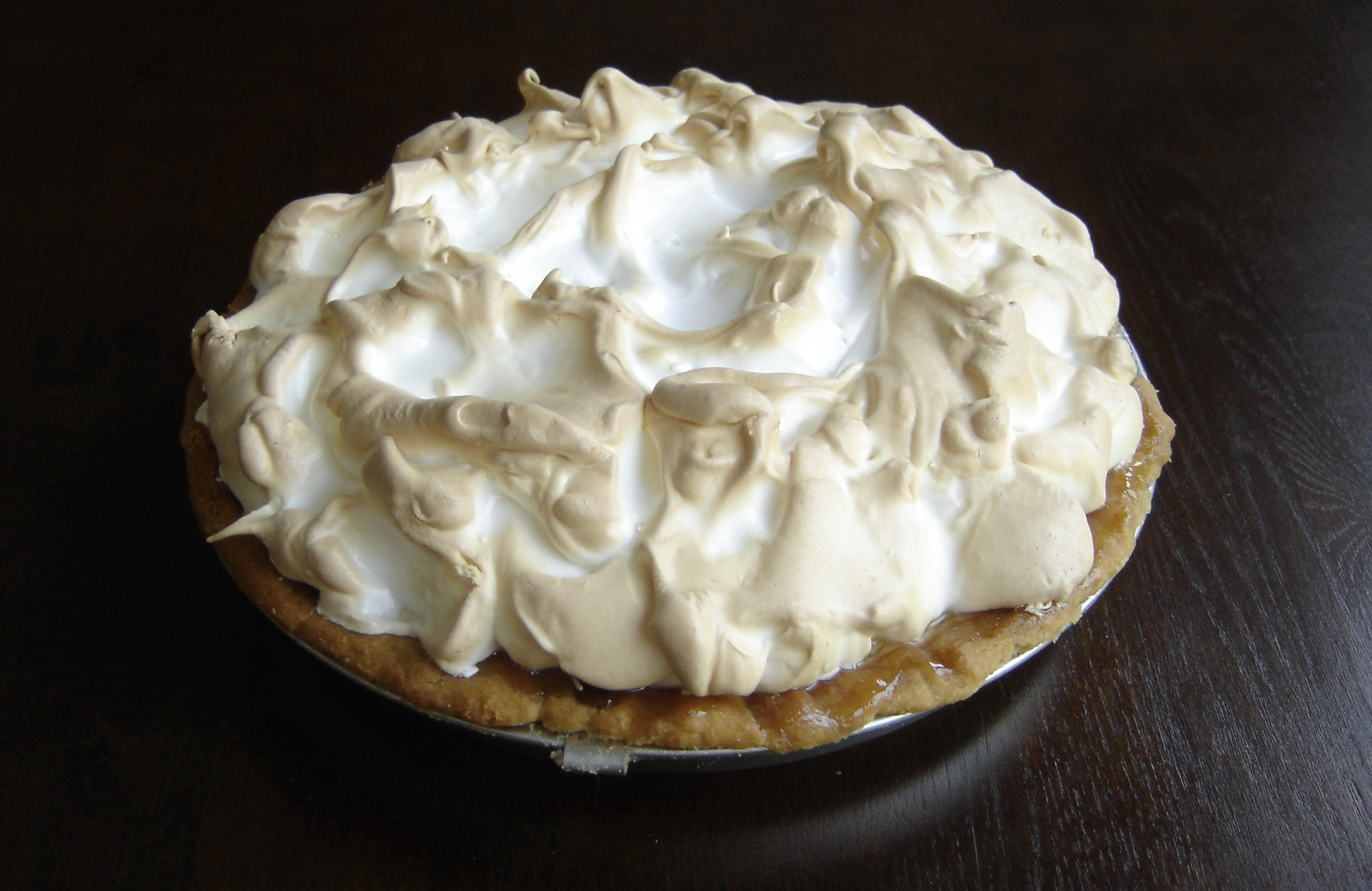 Foto van een Key lime pie, een taart van zandgebak met een vulling van room, limoen en eiwitschuim.